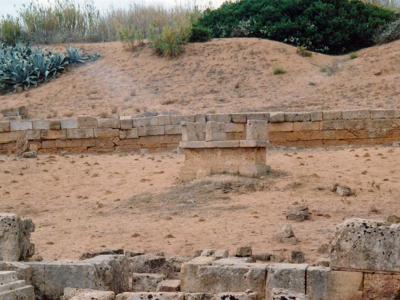 Selinunte, Sicilia, Italia